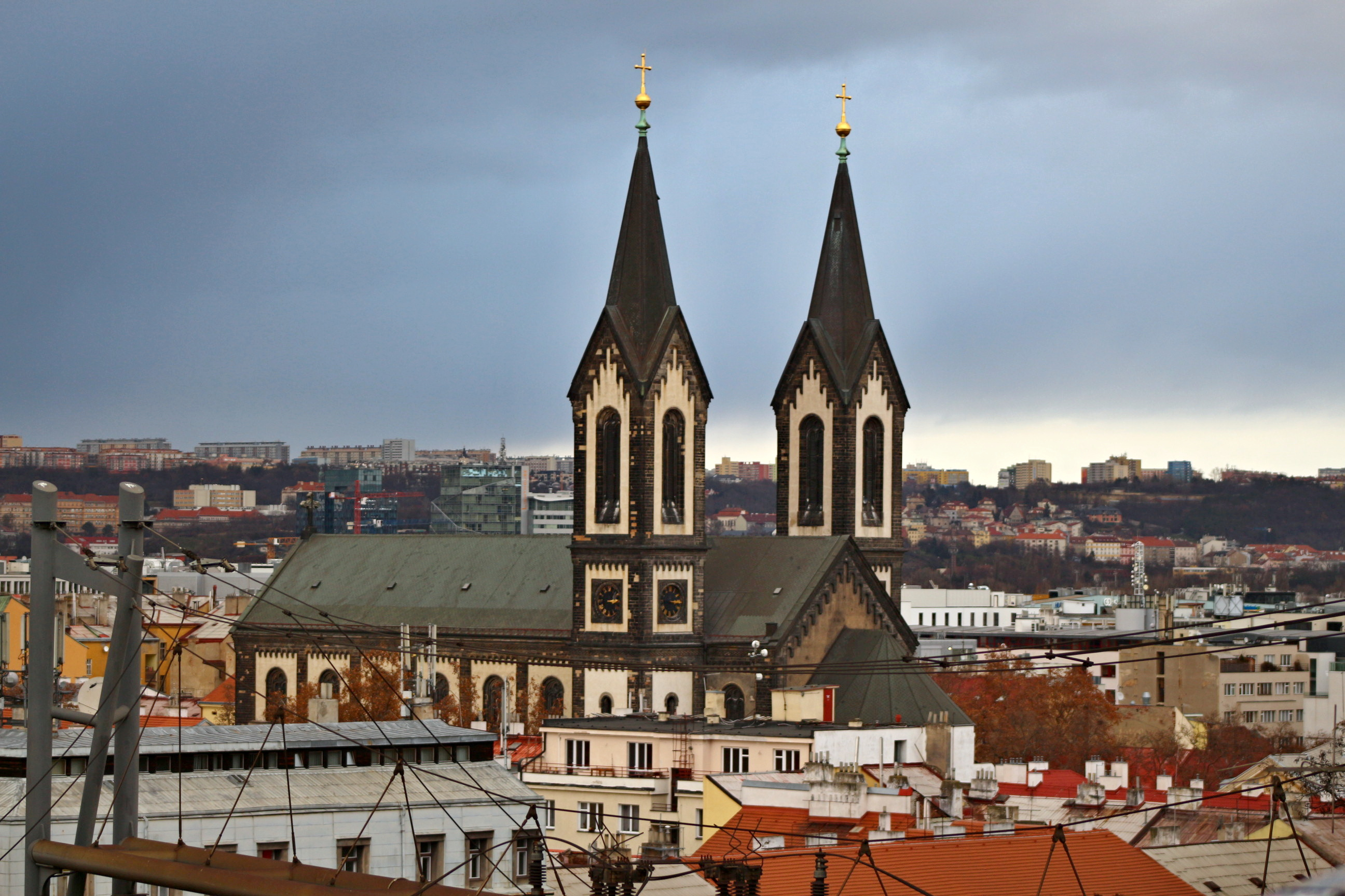 Kostel svatých Cyrila a Metoděje v Praze 8-Karlíně